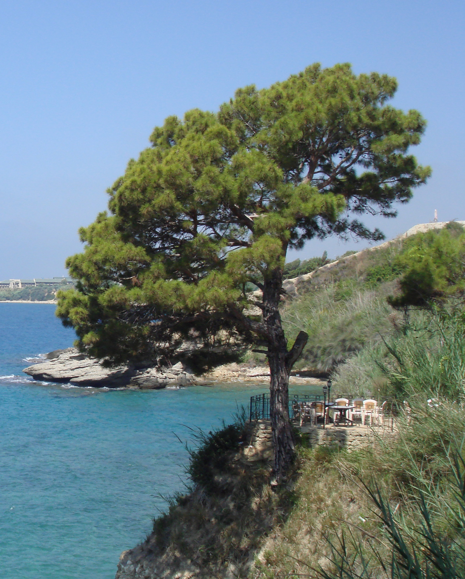 Pinus brutia, Avsallar, Antalya Prov., Turkey 36°37'37"N 31°45'27"E